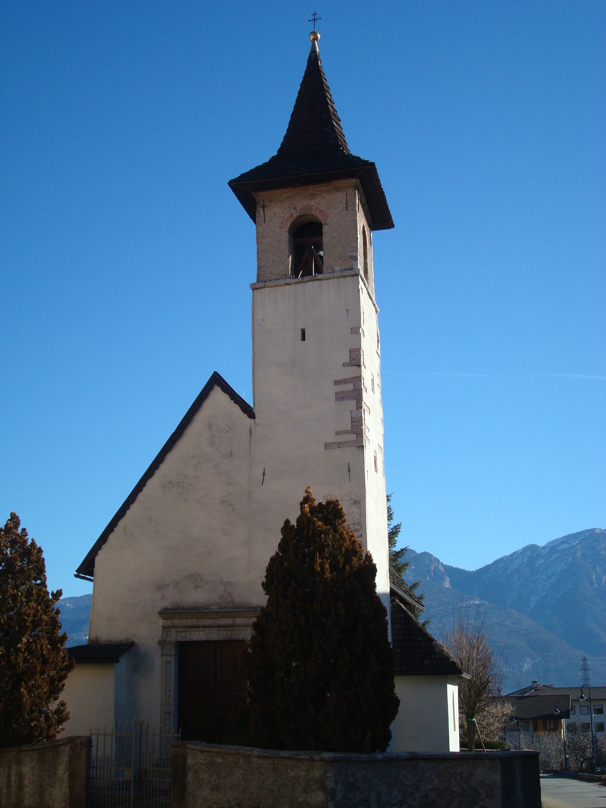 Chiesa di San Lorenzo a Cunevo